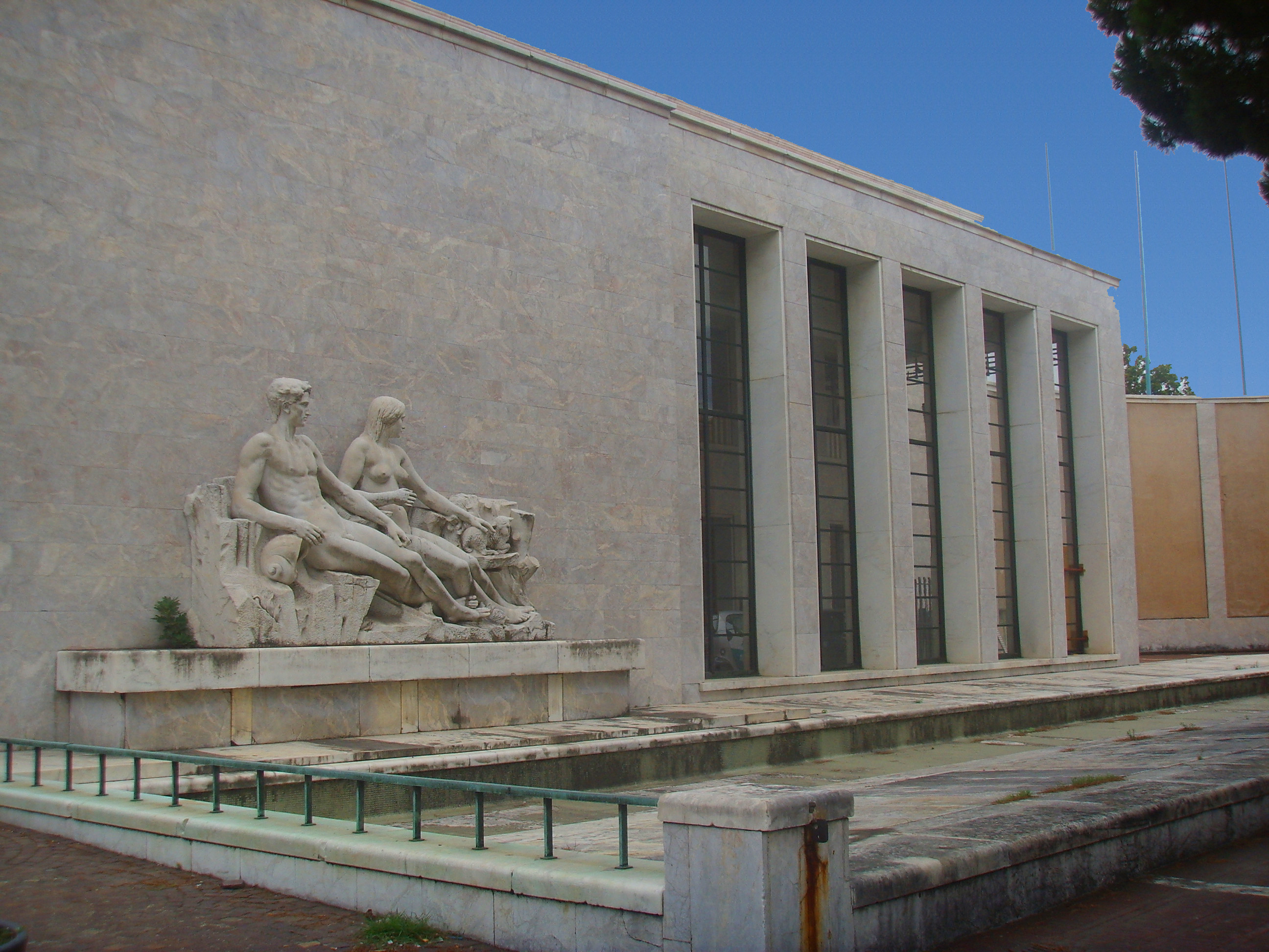 Fontana Stazione SMN